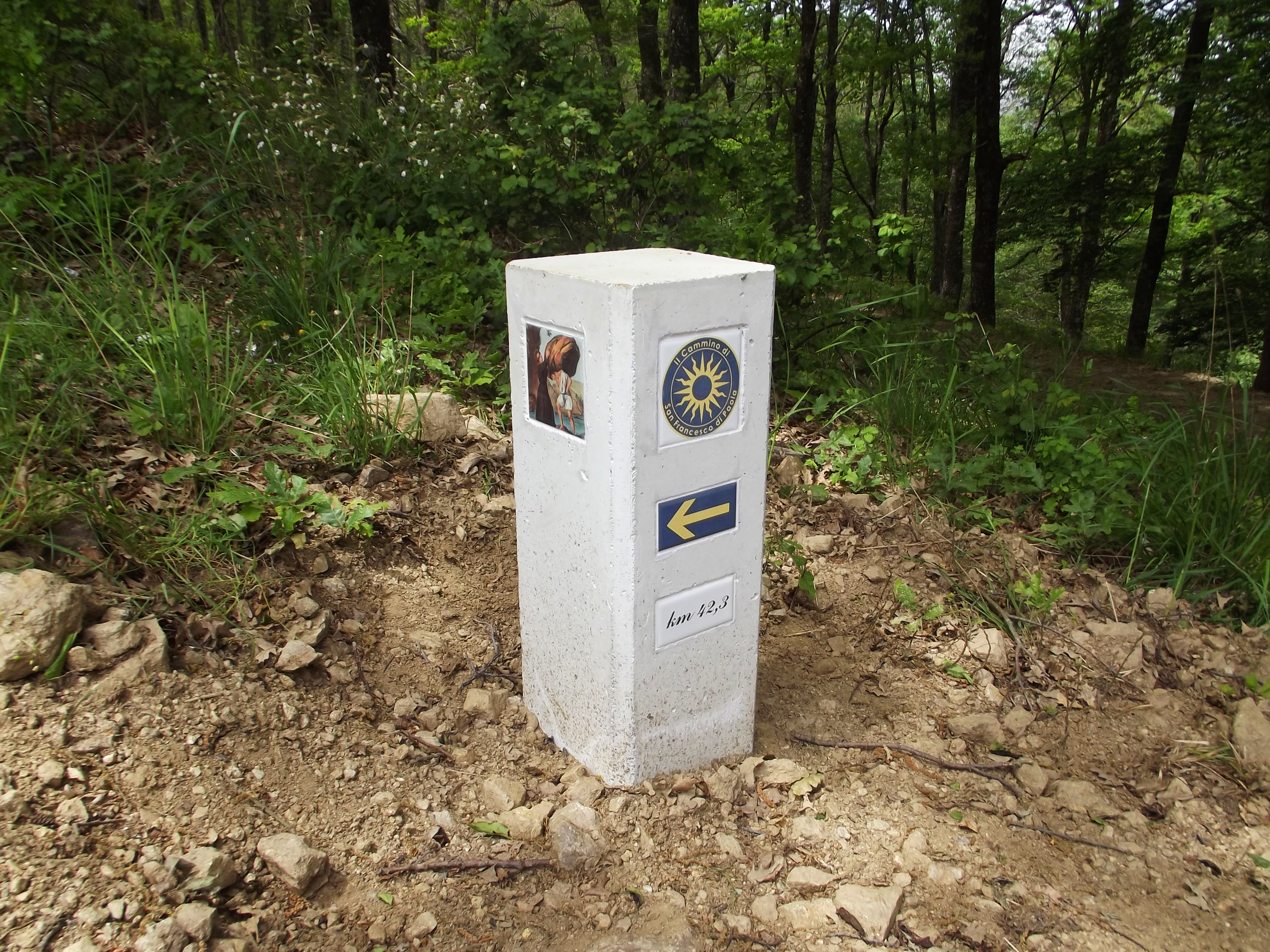 Pietra segnaletica, elegantemente decorata con il “Sole”, simbolo del Cammino, una freccia gialla indicante la direzione da percorrere, i km mancanti e una scena della vita di San Francesco, diversa per ogni pietra.